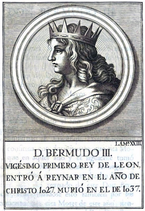 Retrato de Bermudo III, vigésimo primero rey de León, ilustración del libro (escaneado por Google) Retratos de los reyes de España, desde Atanarico hasta ... D. Carlos III.